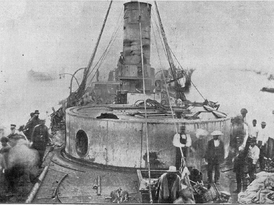 Daños en la cubierta principal y la torre de artilleria del monitor Huáscar durante el combate naval de Angamos.